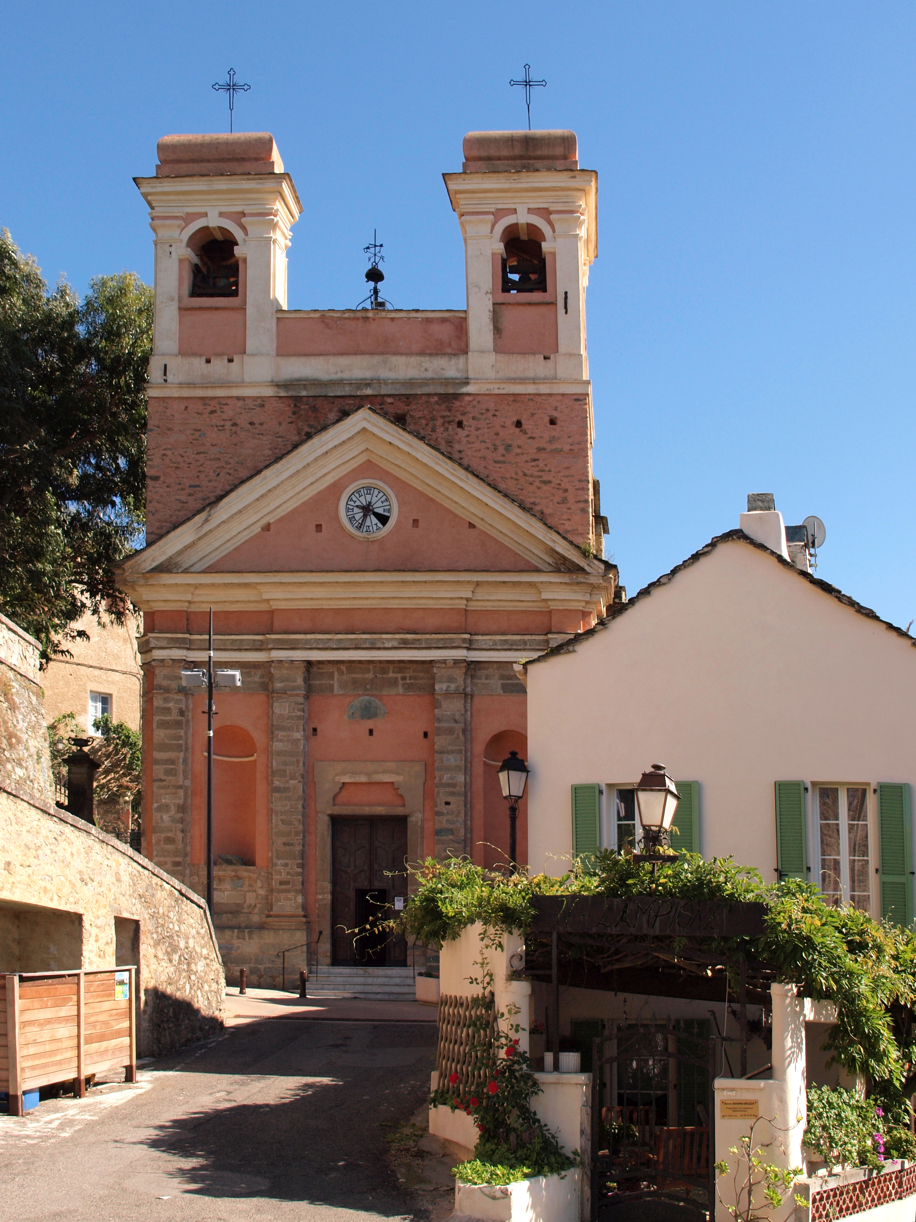 Oletta, Nebbio (Corse) - Église Saint-André d'Oletta (MH)